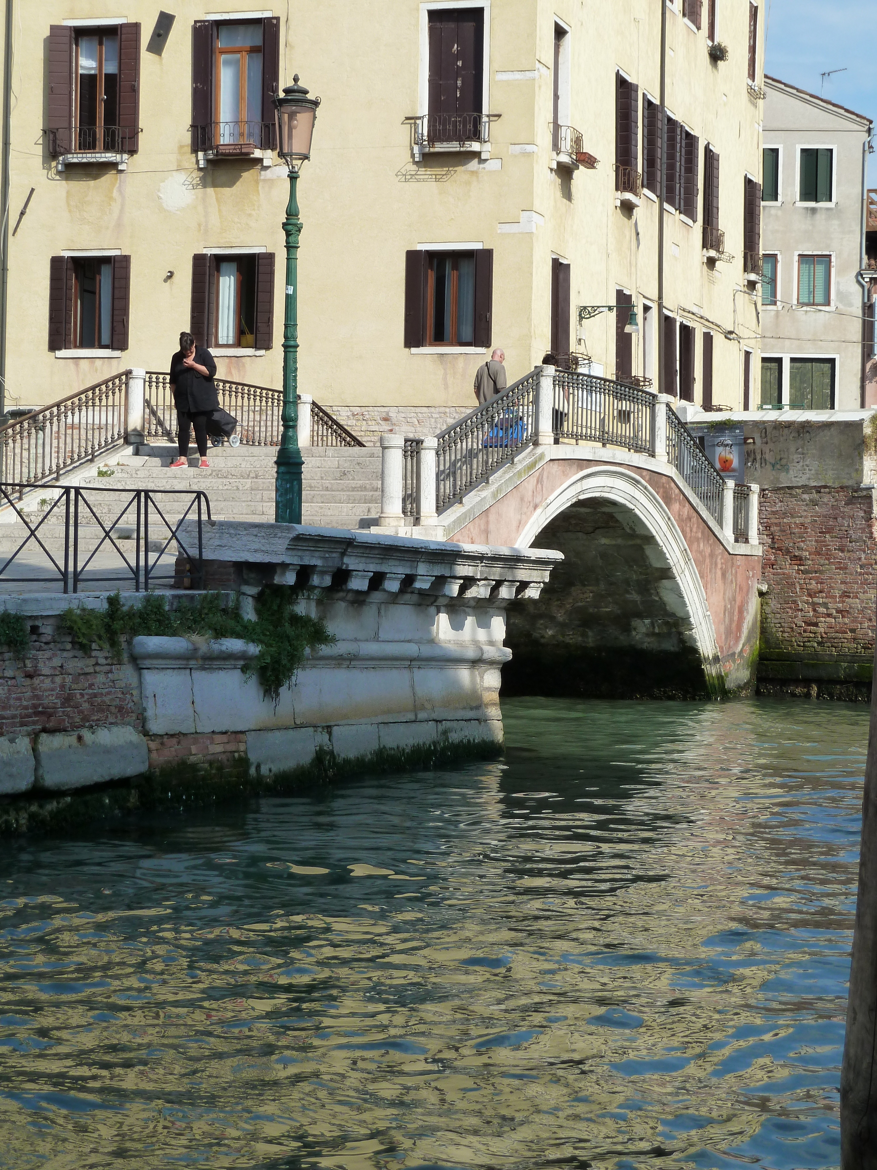 Ponte de la Misericordia (Venice)